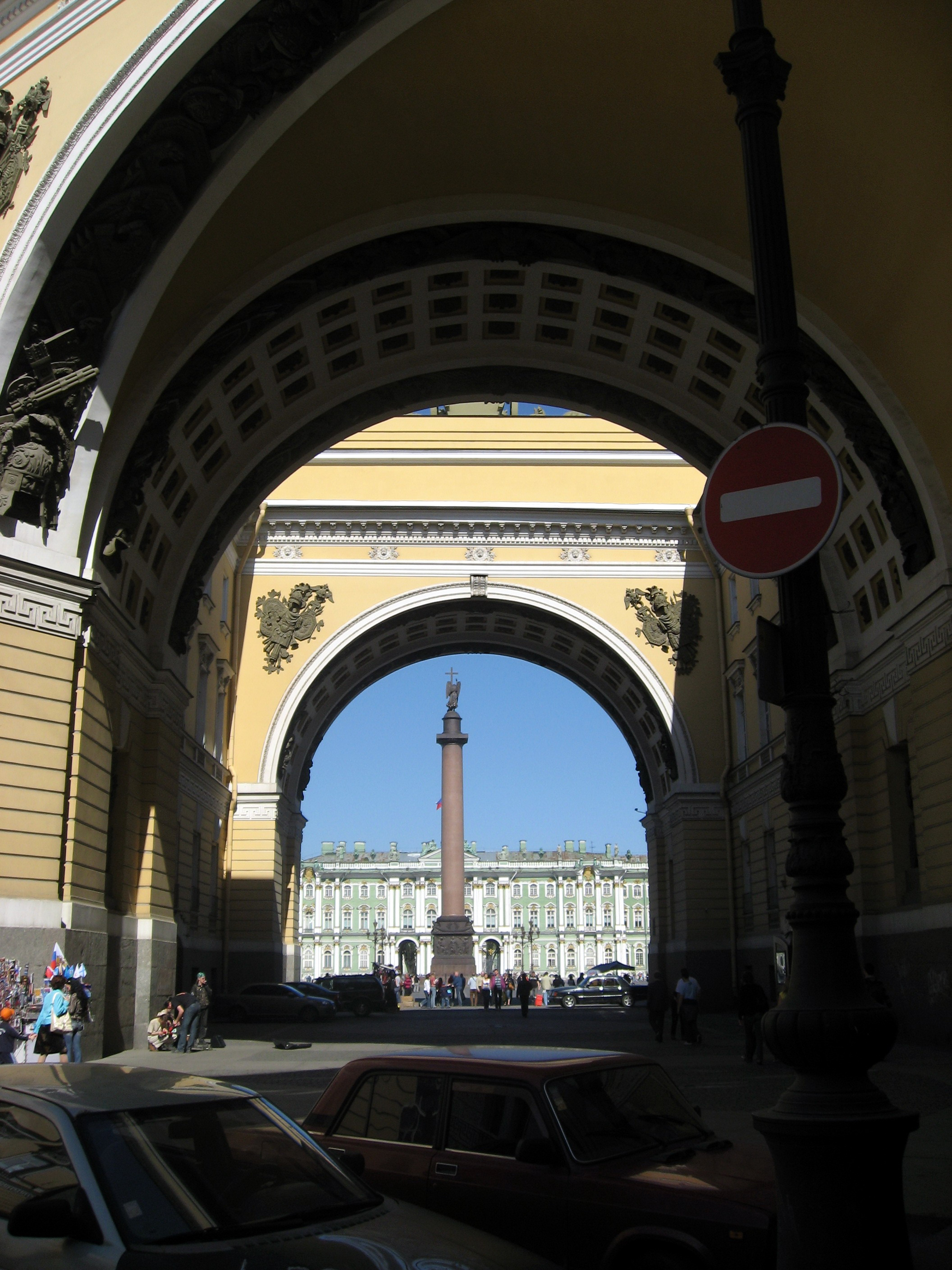 Sankt-Petěrburg (Petrohrad)